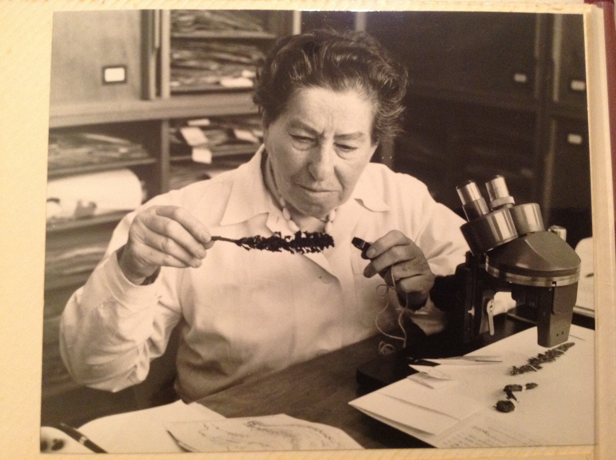 צילום של נעמי פיינברון במעבדתה